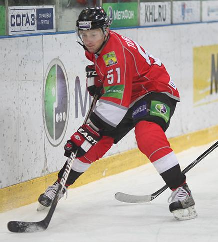 Нападающий новокузнецкого «Металлурга» Константин Турукин во время матча чемпионата КХЛ против ханты-мансийской «Югры» 5 января 2013 года.